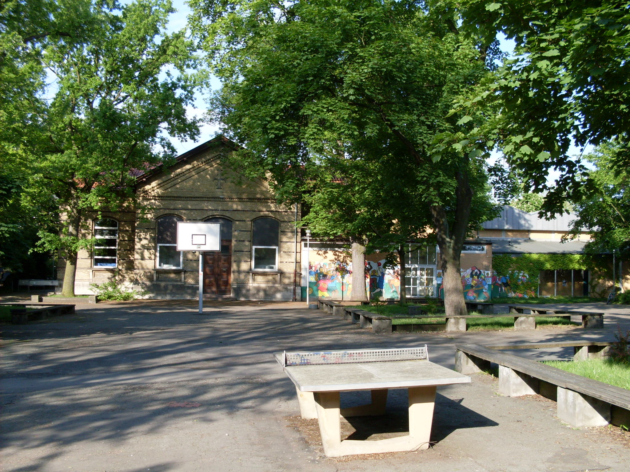 Frontansicht der Großen Schule Wolfenbüttel